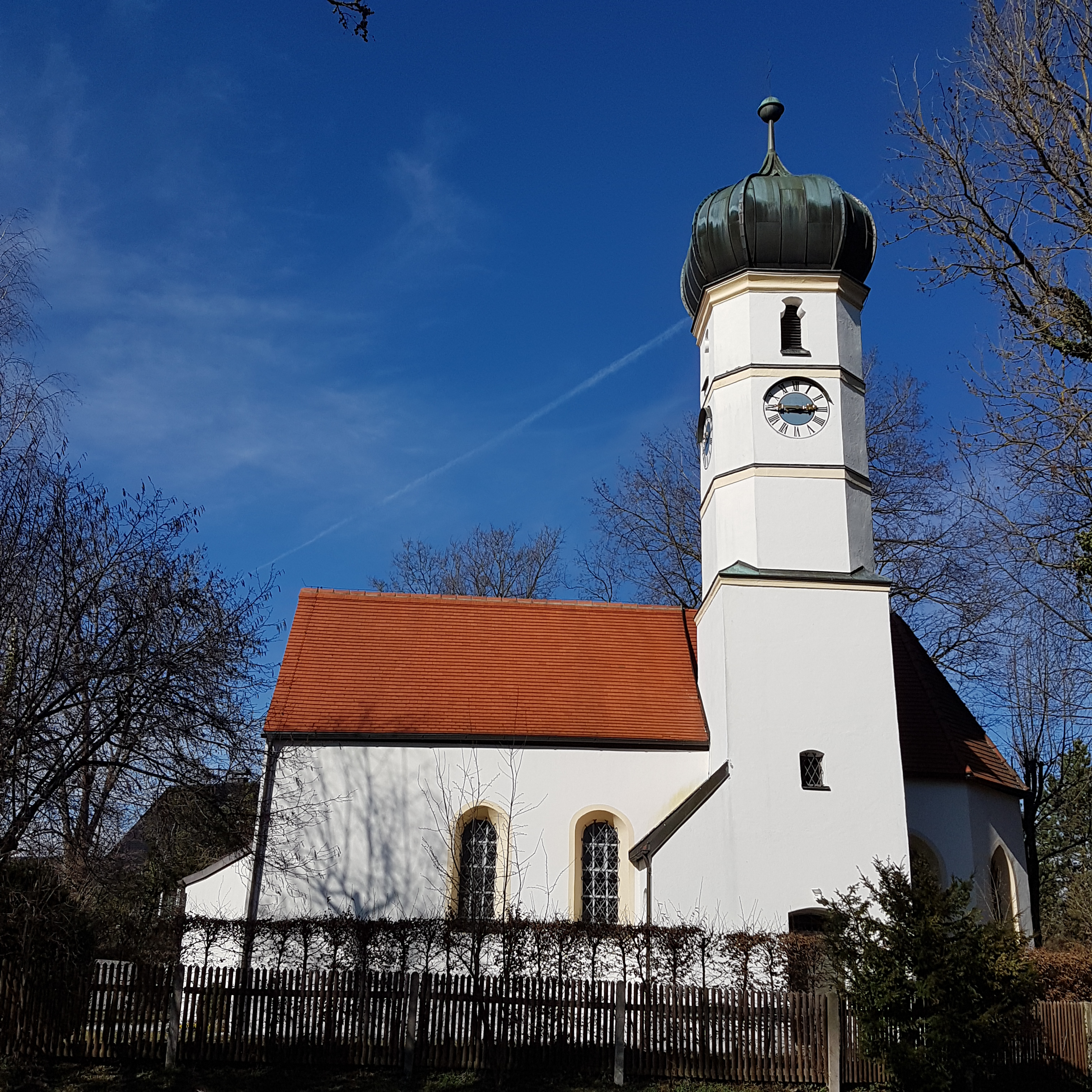 St. Margaret (Krailling), Ansicht von Süden